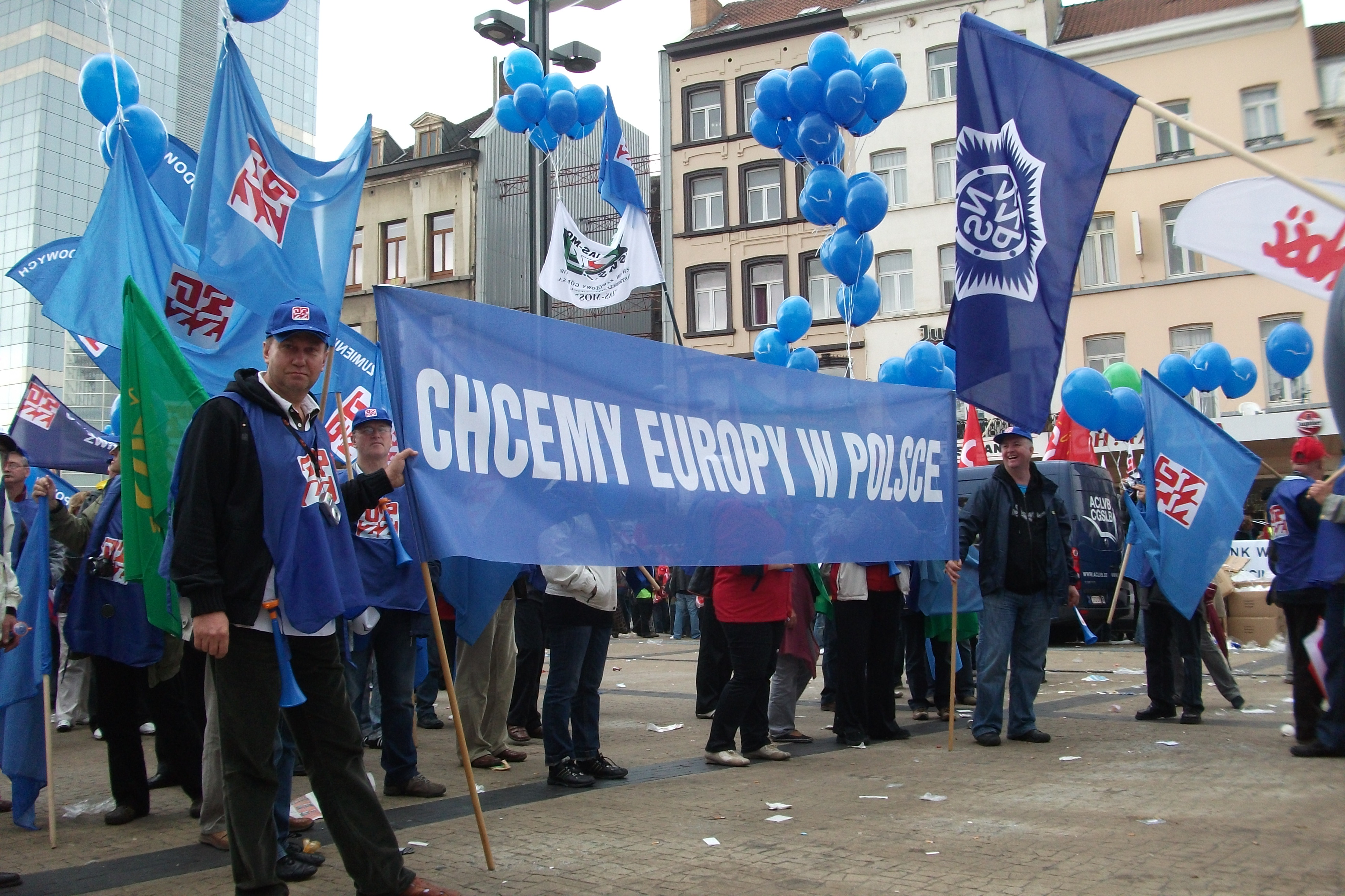 des membres de l'OPZZ manifestant en 2010 à Bruxelles contre l'europe de l'austérité.